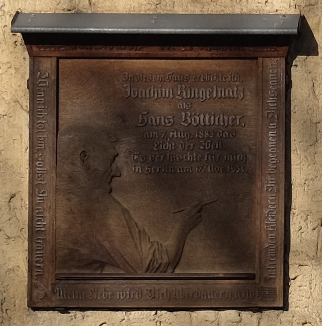 Am Geburtshaus im Crostigall 14 erinnert eine Gedenktafel an den Sohn der Stadt. Diese Holzschnitt-Tafel wurde 1945 im Beisein seiner Schwester Ottilie Mitter und des damaligen Wurzener Museumsleiters am Geburtshaus angebracht.